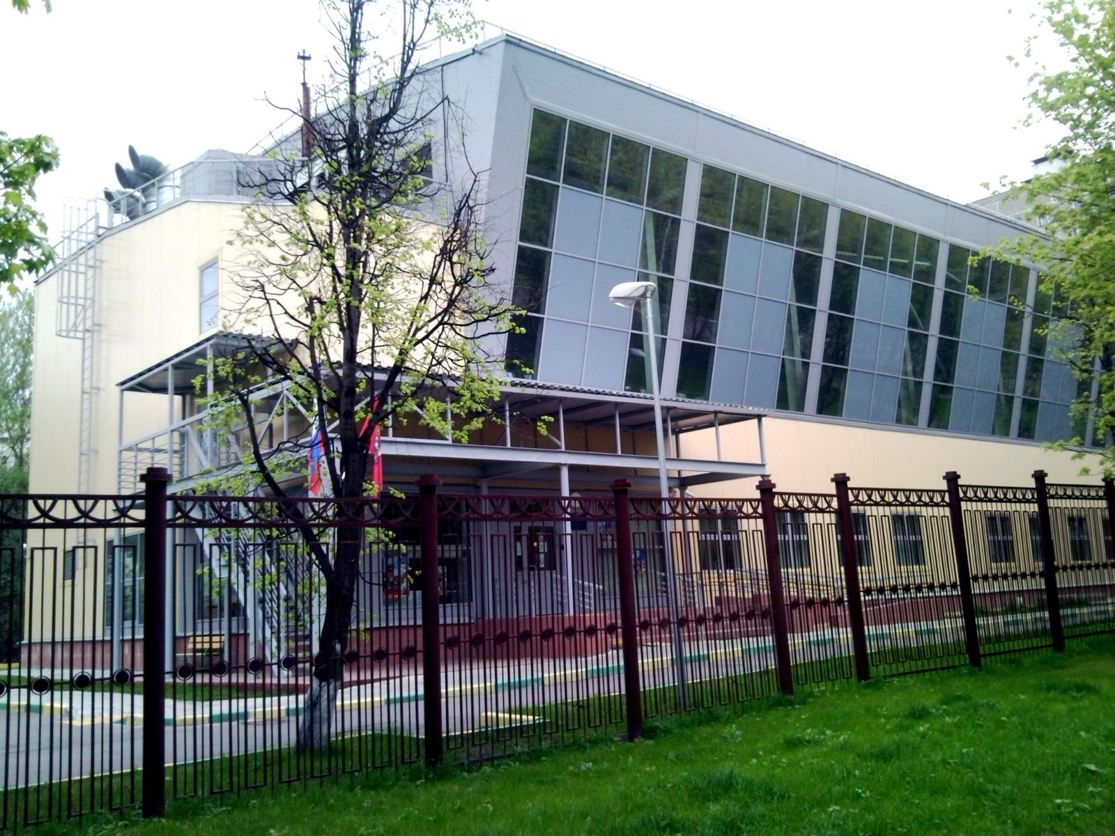 Москва, Донбасская улица, дом 5. Здание физкультурно-оздоровительного комплекса при ДЮСШОР № 45.